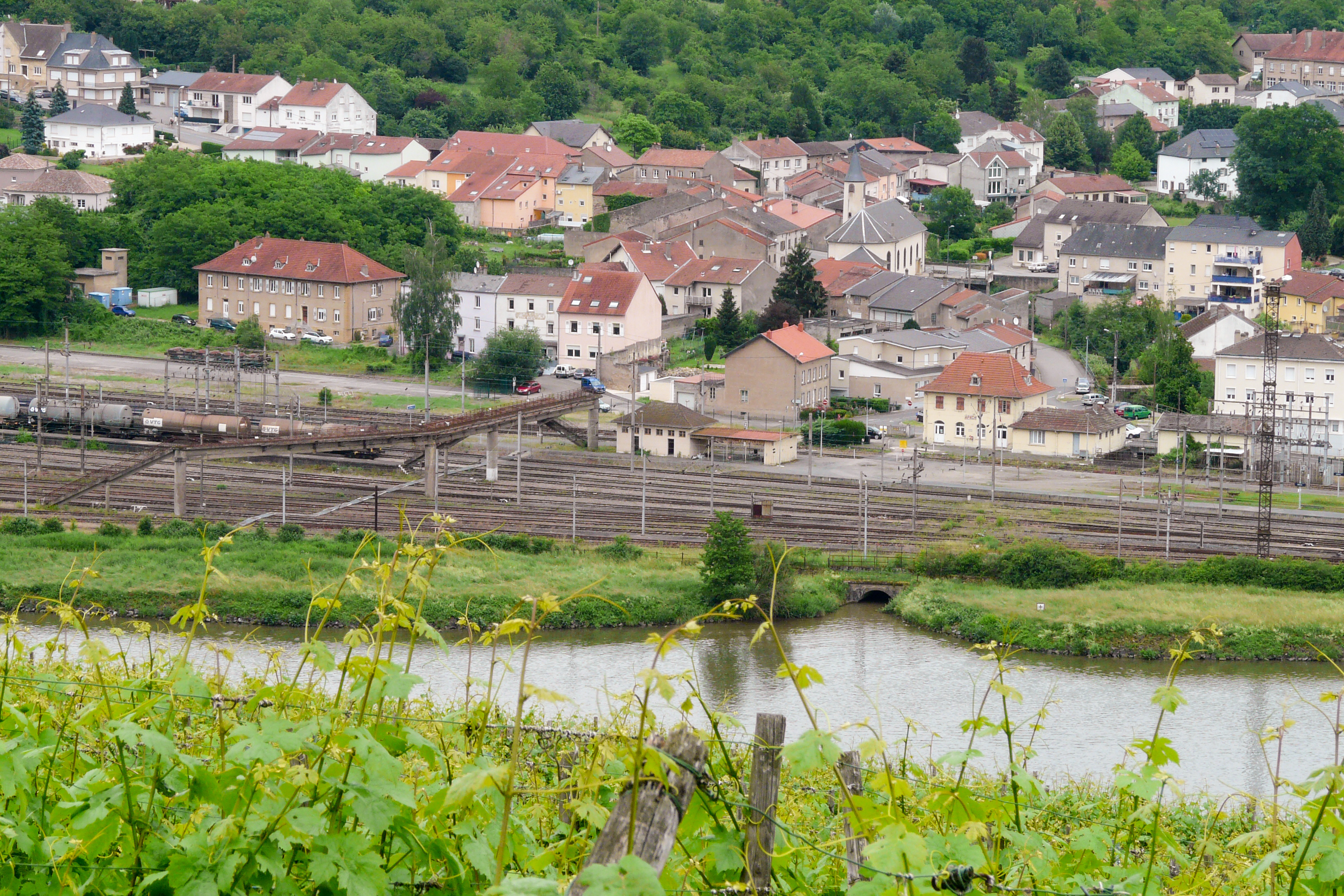 Apach, Bahnhof, Blick vom anderen Moselufer.